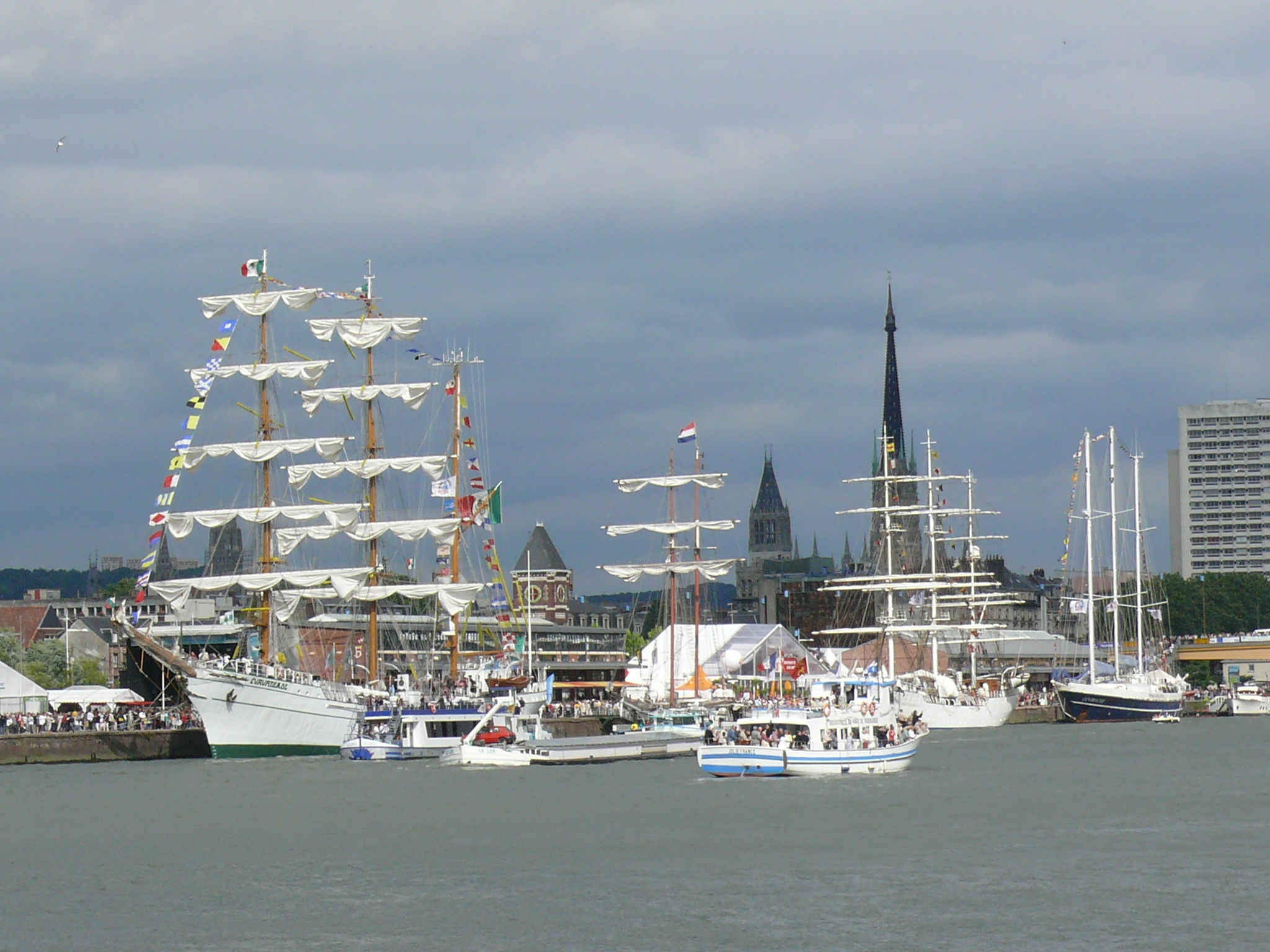 Ambiance de l'Armada Rouen 2008 : Cuauhtemoc se détachant sur la Cathédrale de Rouen